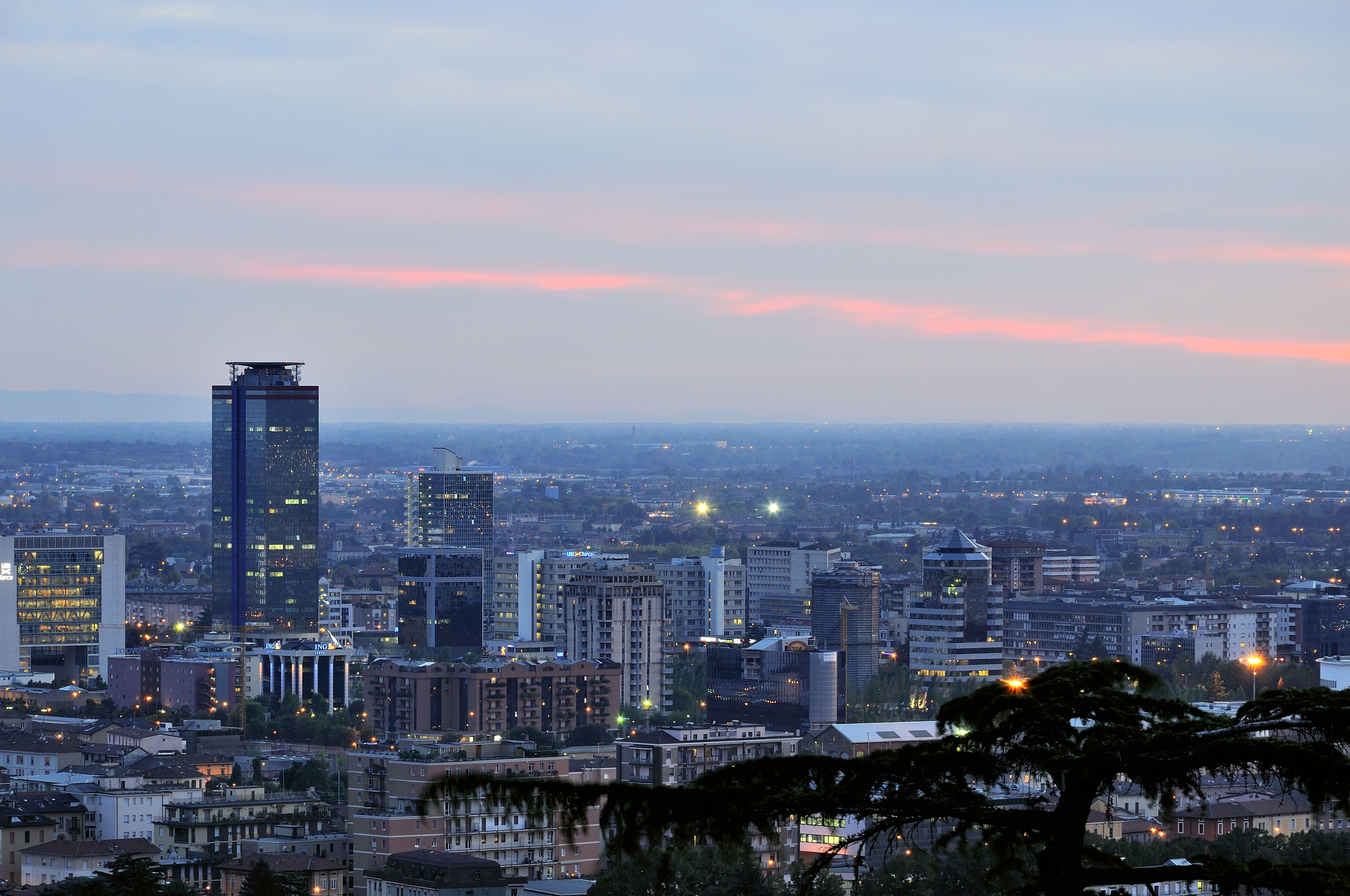 Tramonto civile